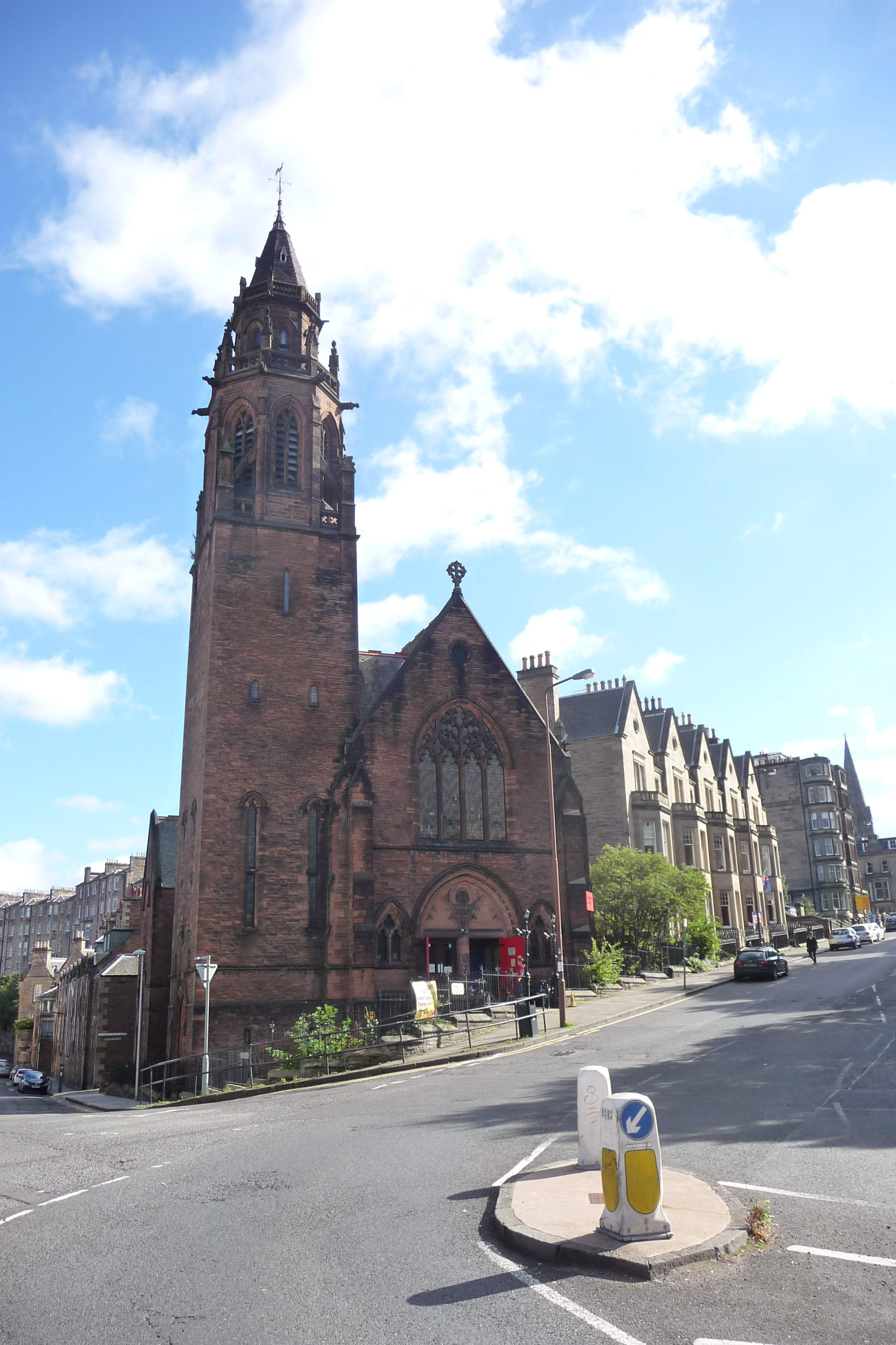 Belford Hostel